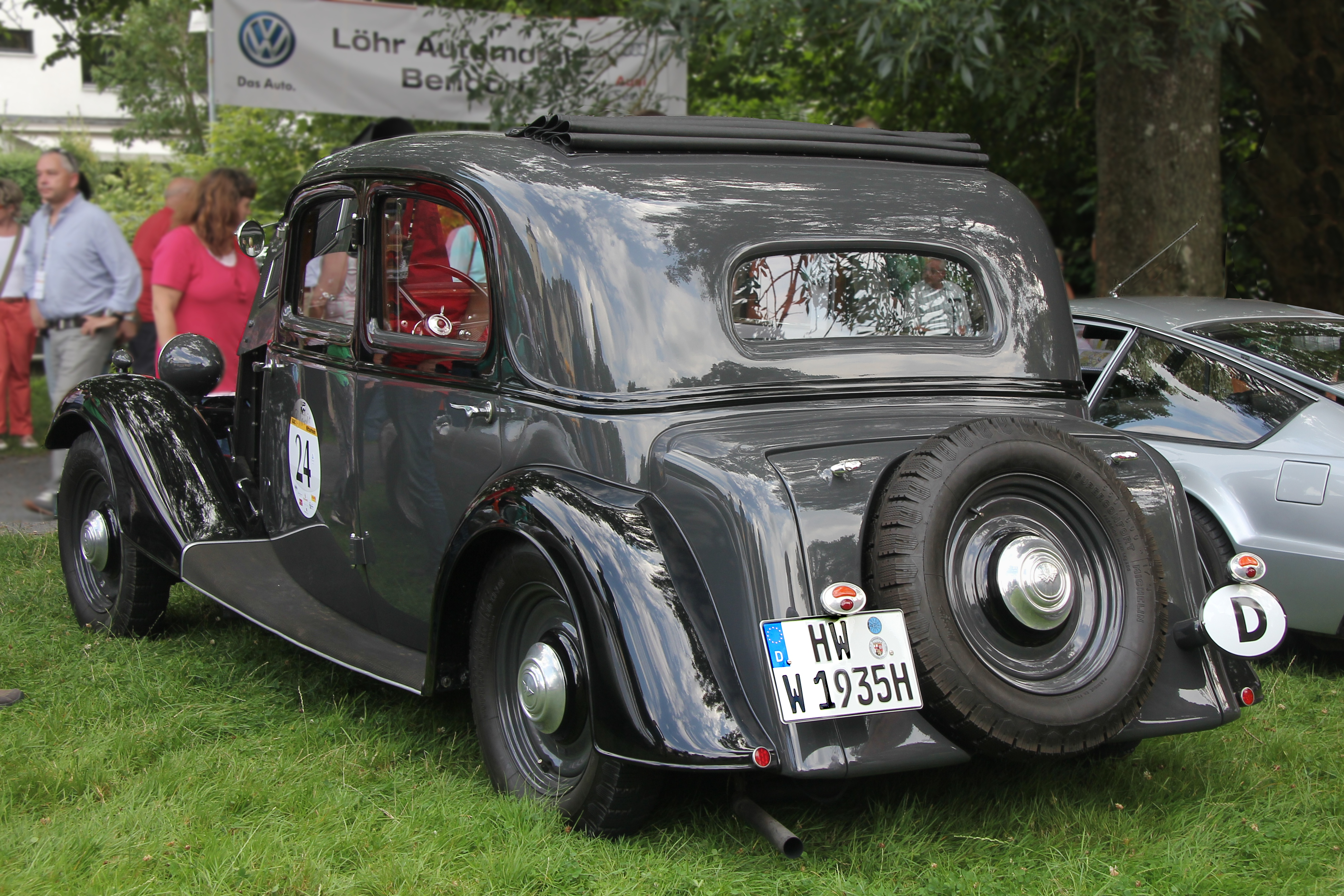 Wanderer W 240, Baujahr 1935, bei der ADAC Mittelrhein Classic; Kennzeichen verändert